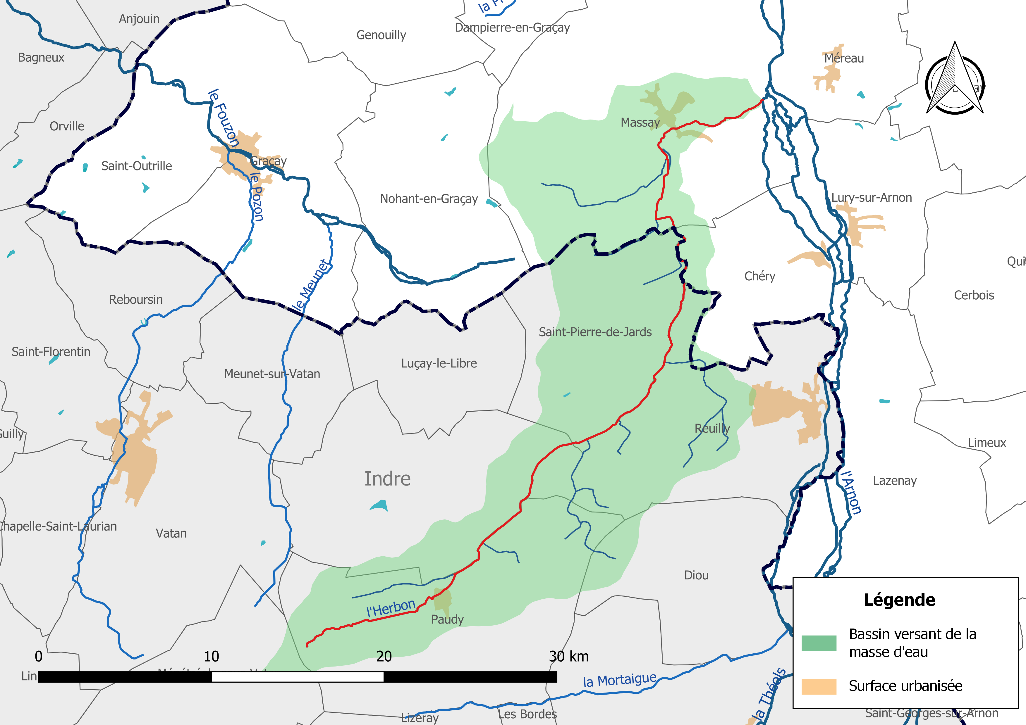 Carte de la masse d'eau « FRGR2106 » avec mise en exergue du cours d'eau « l'Herbon » (en rouge).